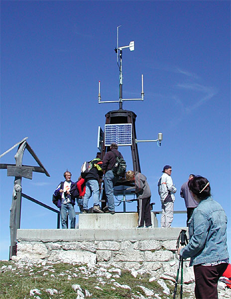 Meteorologische Stationen "Hannwarte" auf dem Hochobir in Kärnten